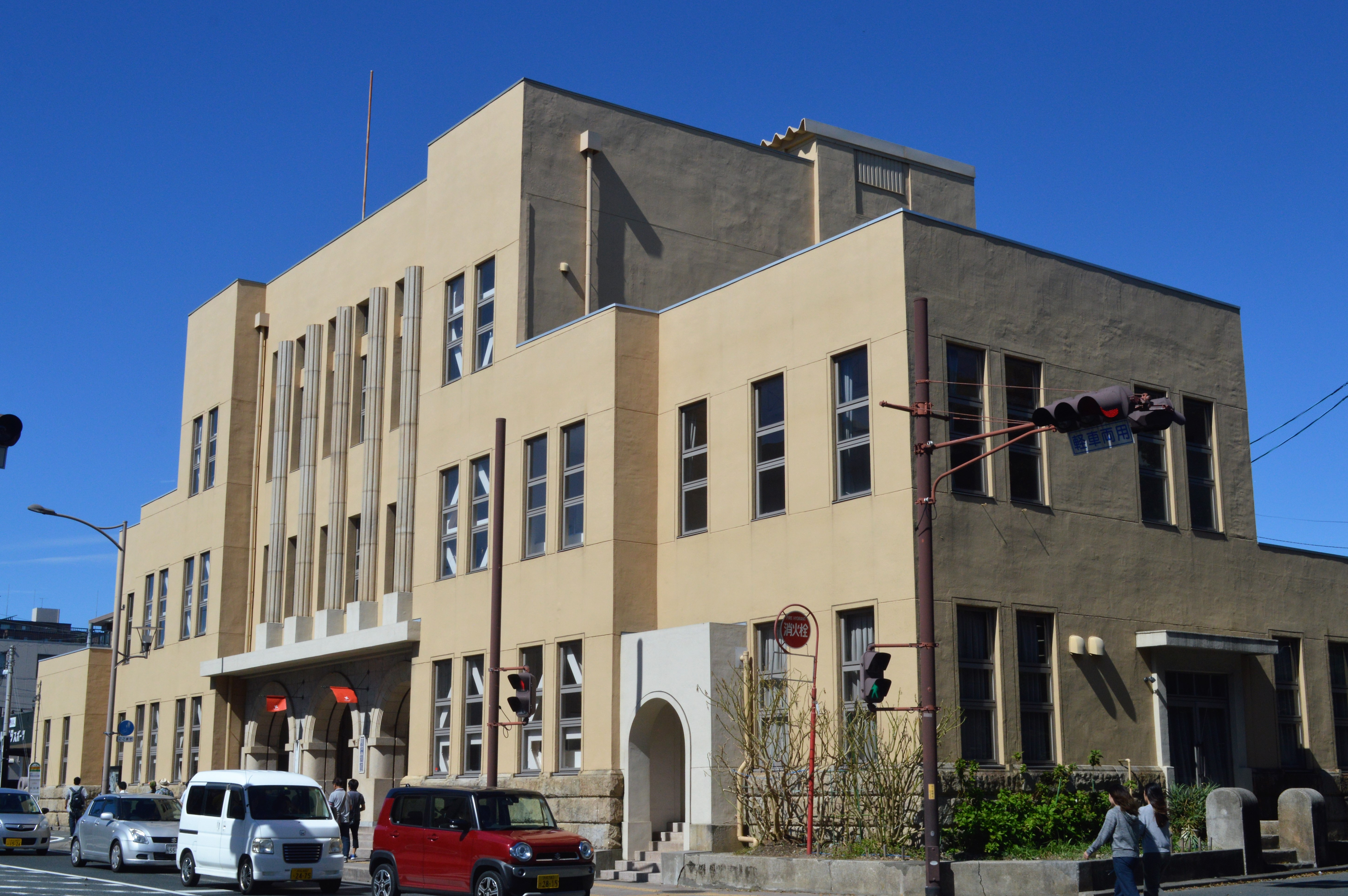 静岡県浜松市の鴨江アートセンター。旧浜松警察署。